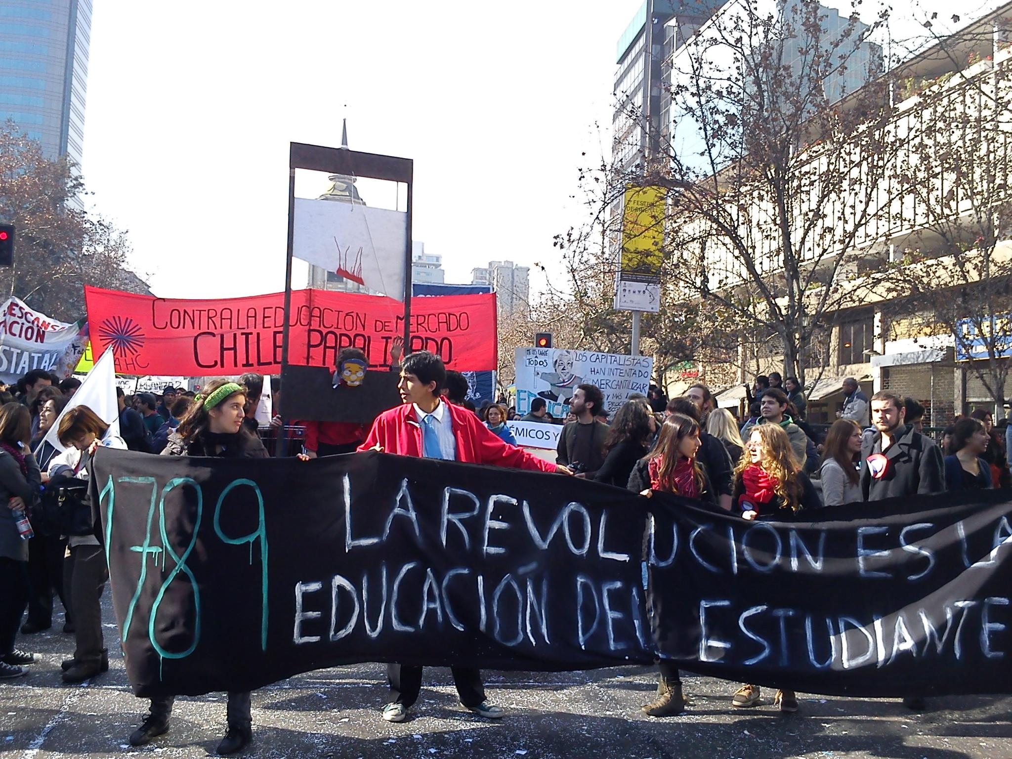 Marcha por la Educación, 14 de julio de 2011.